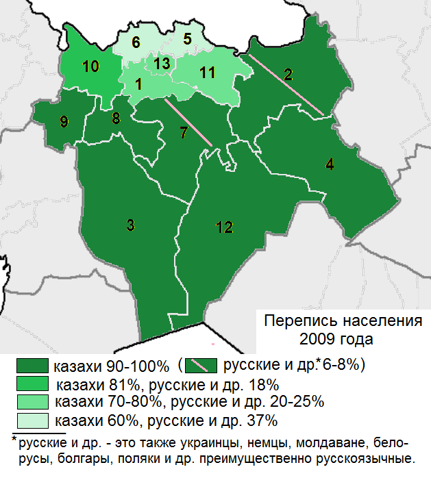 Доля казахов, русских и других по районам Актюбинской области по итогам переписи населения 2009 года